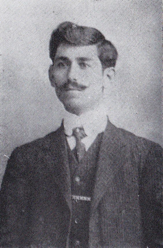 Bulgarian revolutionary Iliya Popnikolov.